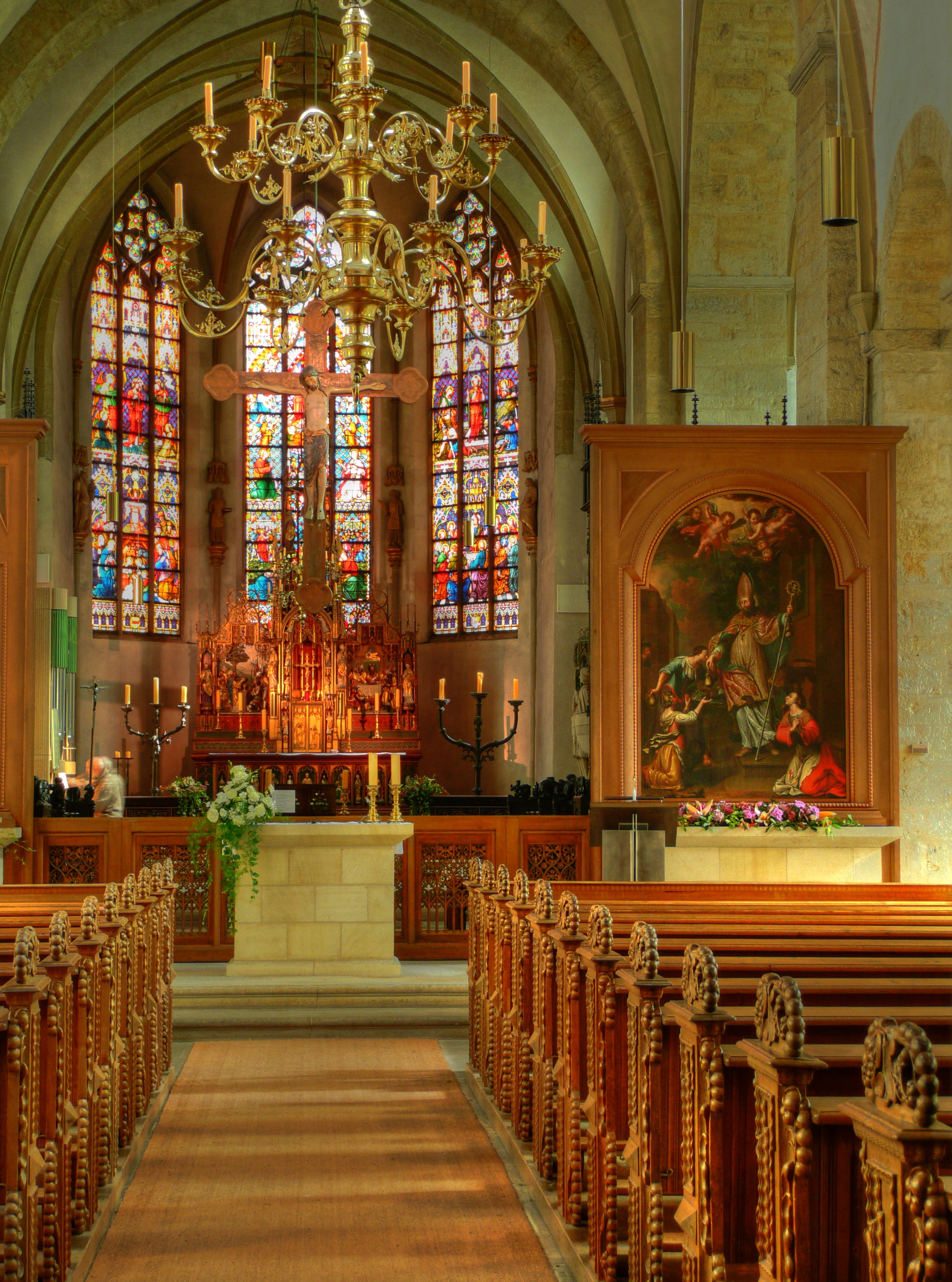 Mittelschiff der Stiftskirche zu Cappenberg, HDR-Foto aus drei digitalen Bildern